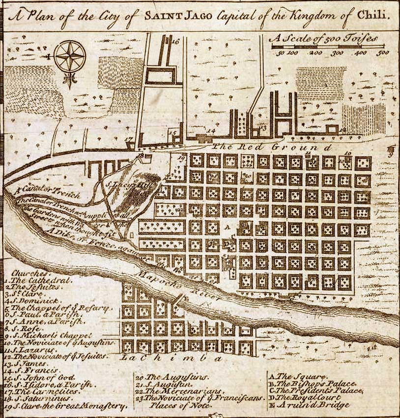 Plano de la ciudad de "Saint Jago" (Santiago), en el mapa de Chile del cartógrafo Emmanuel Bowen, en 1747.